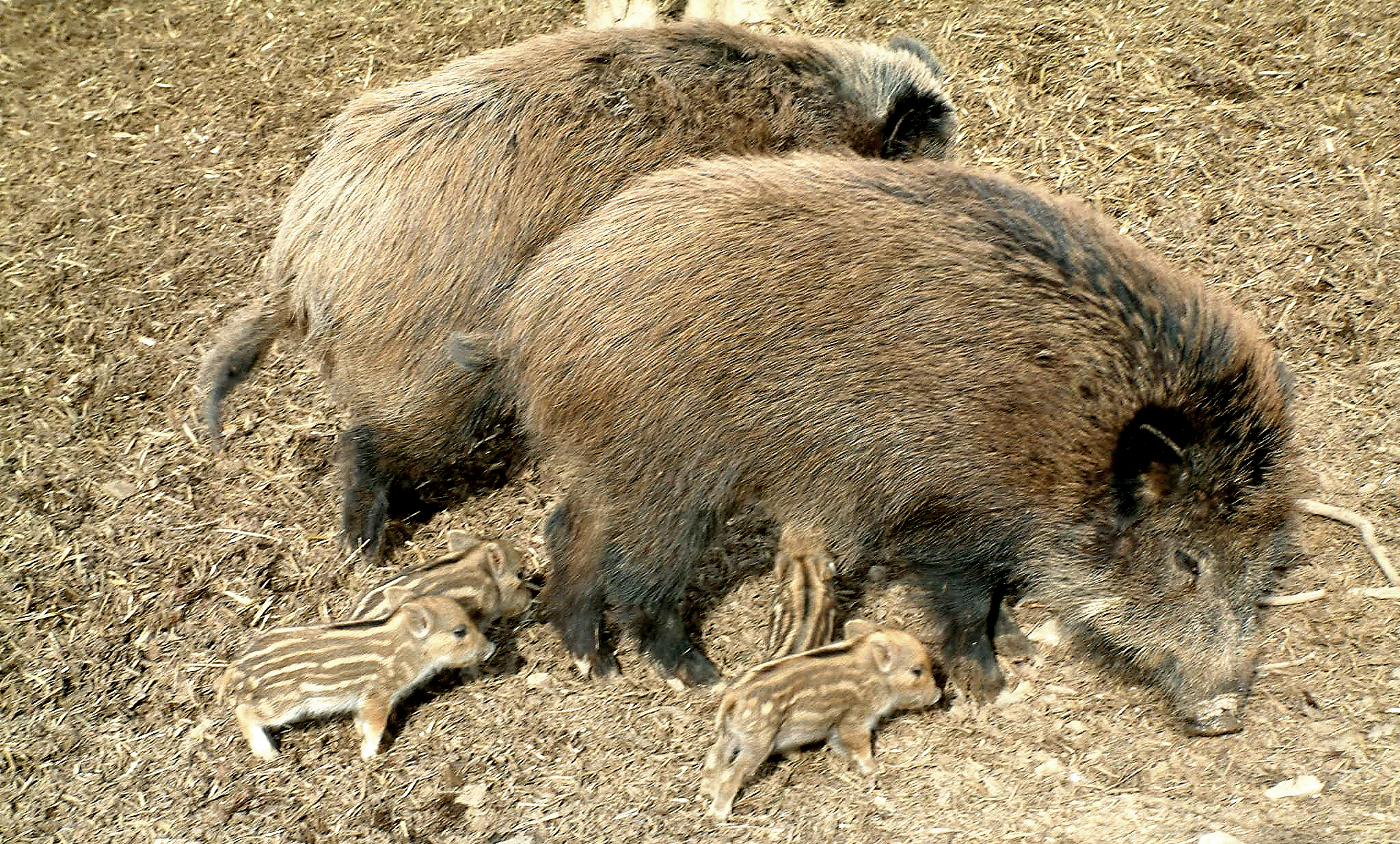 Wild boar, Sus scrofa, Wildschwein